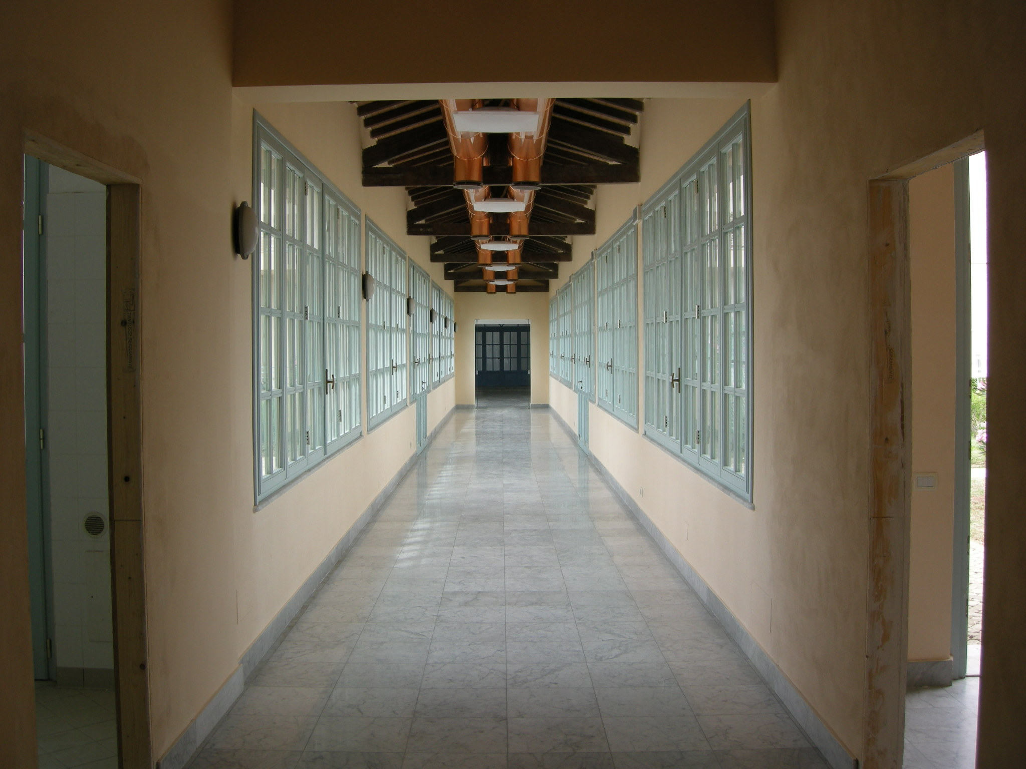 Colonia principi di piemonte, corridoio